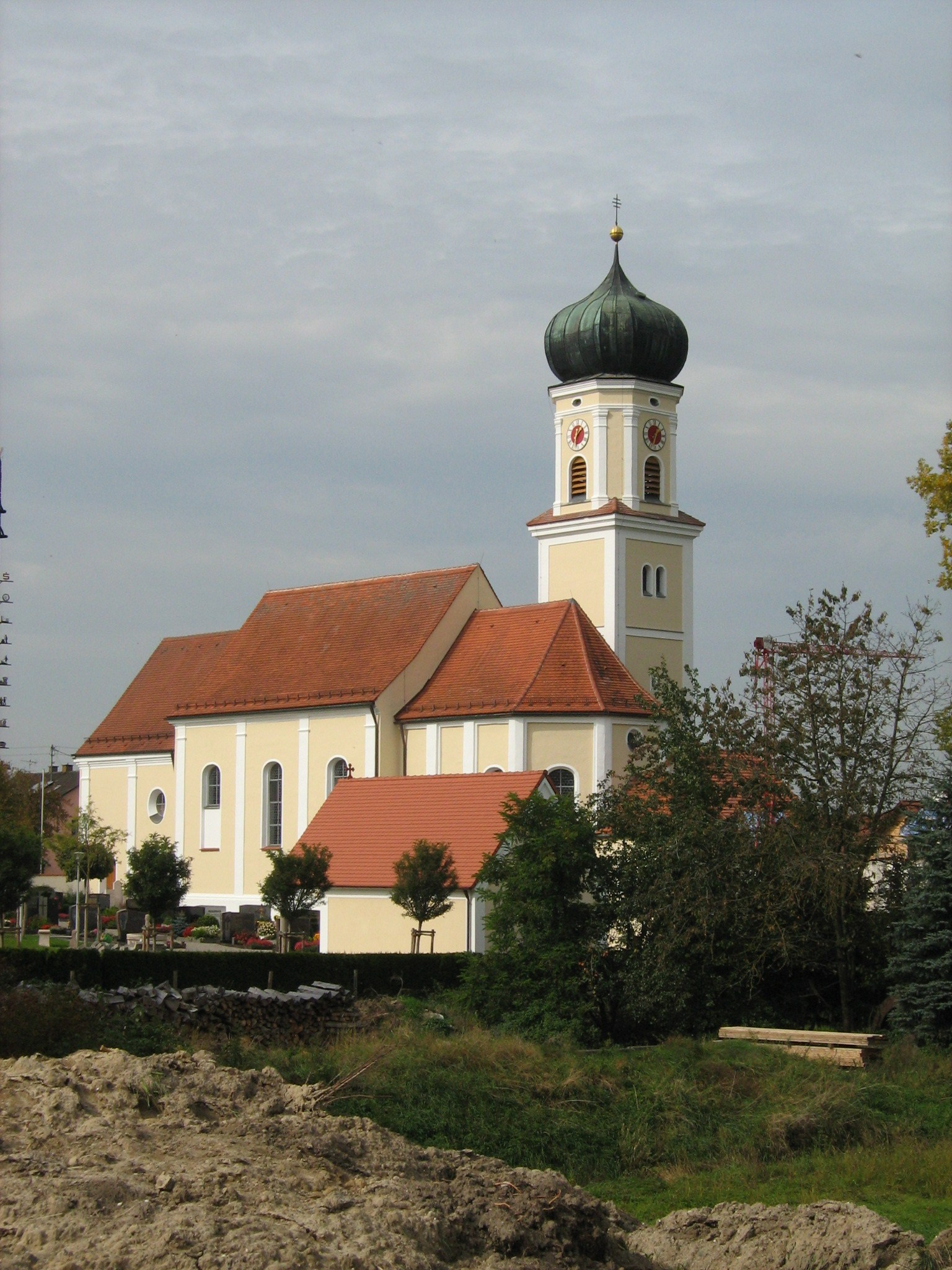 Kath. Pfarrkirche St. Jacobus in Haunswies (Gemeinde Affing)